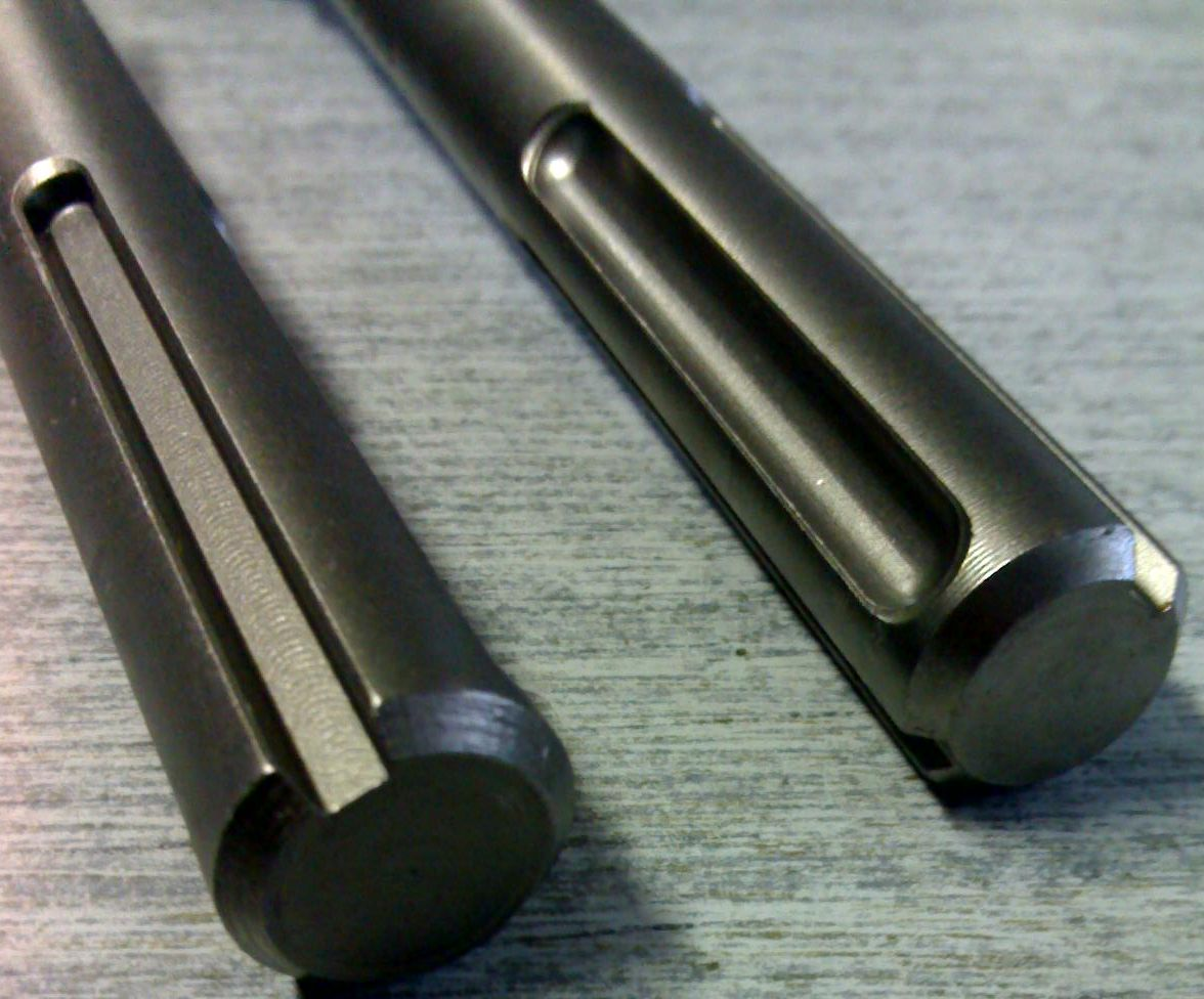 SDS Max drill shanks